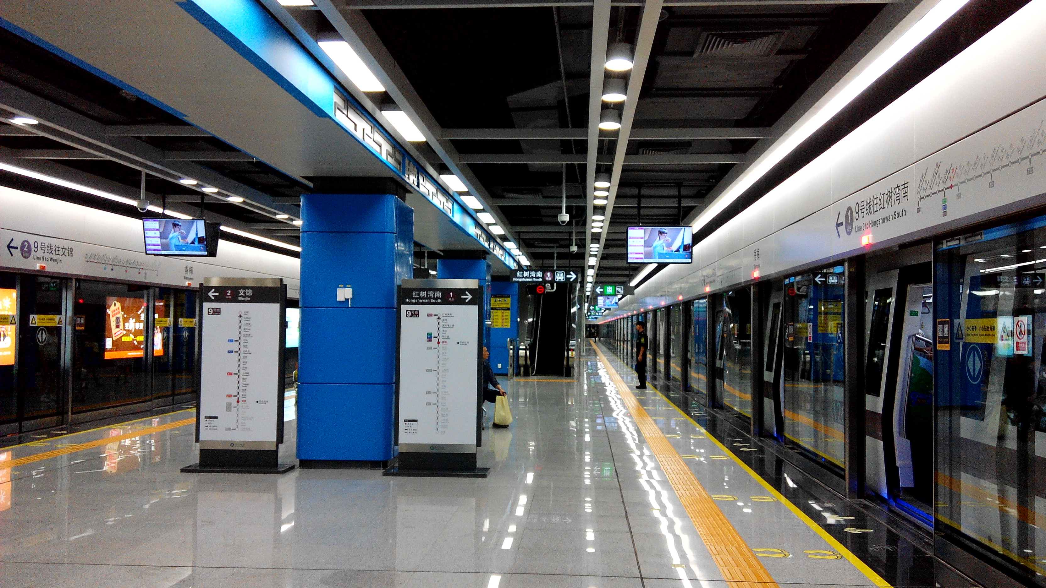 深圳地铁9号线 香梅站站台